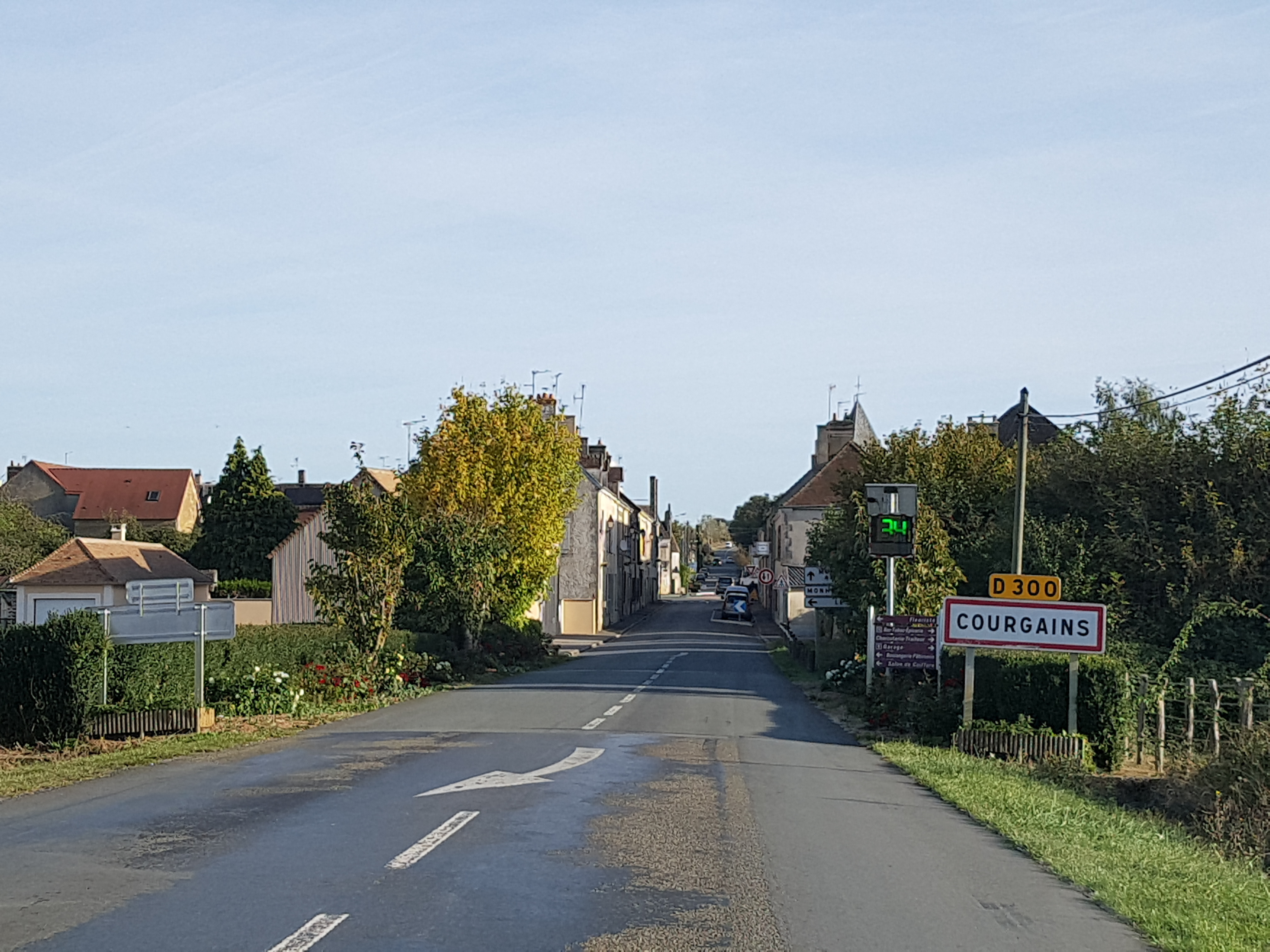 Entrée sud de Courgains, depuis la départementale 300